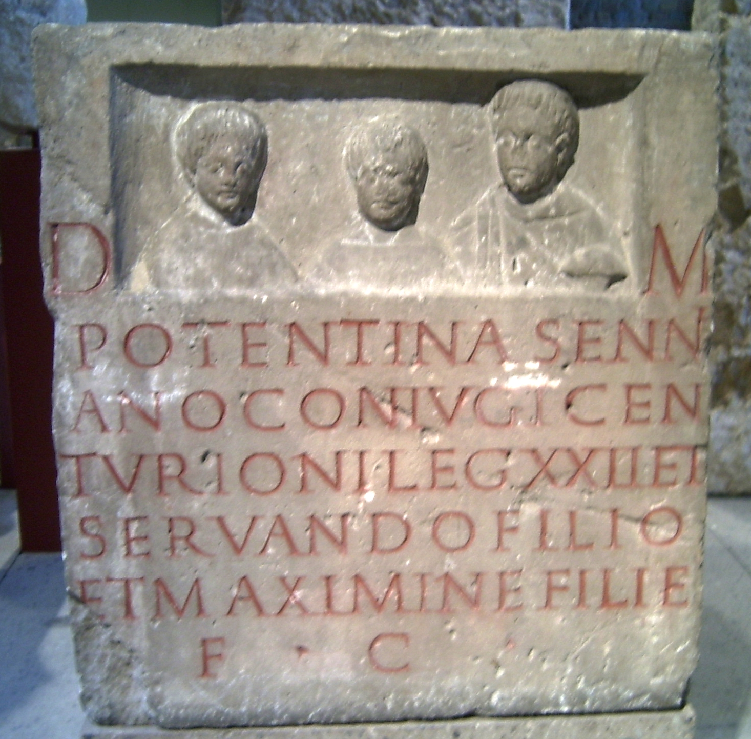 CIL XIII 8290. For other images, see gallery Römisch-Germanisches Museum.